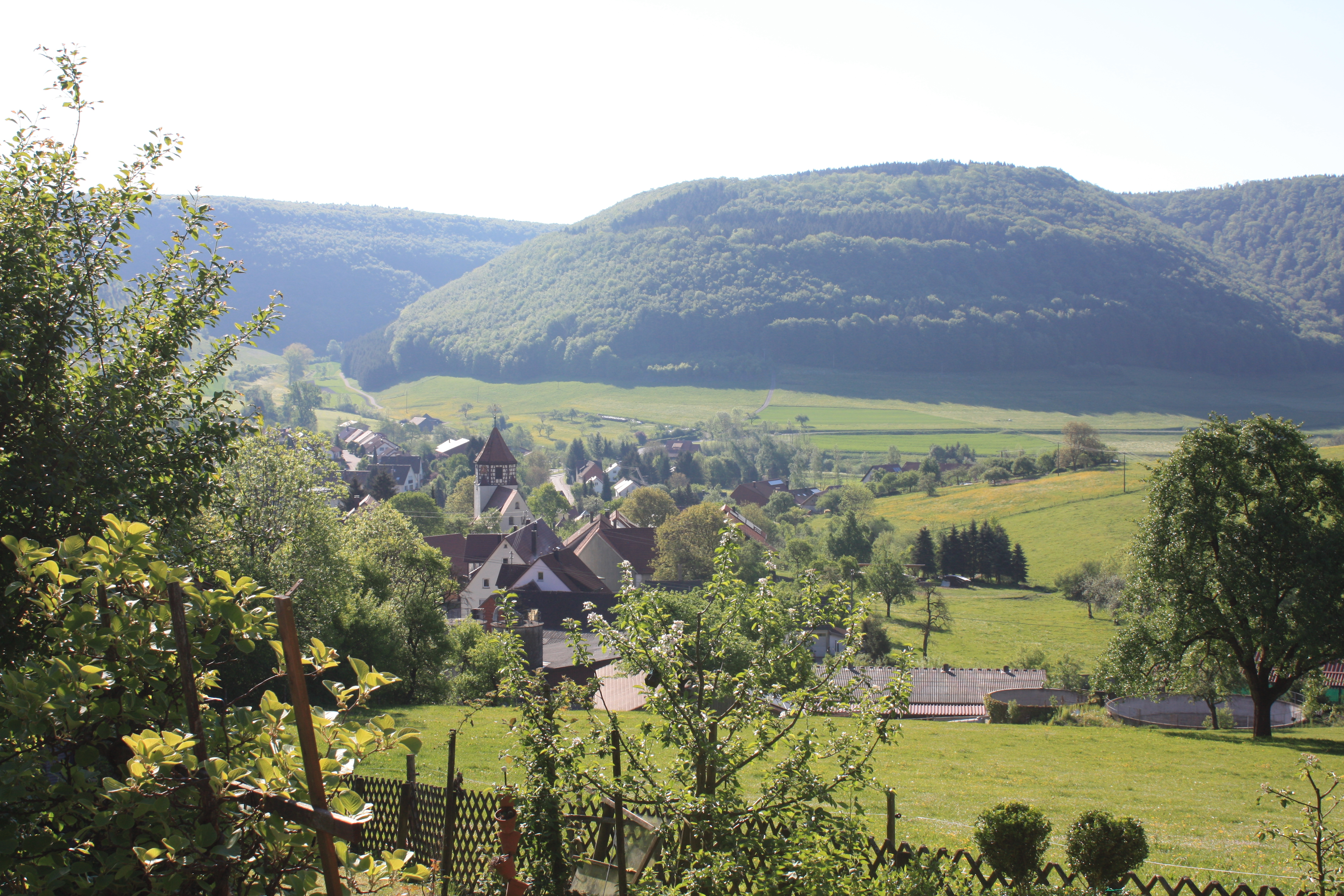 Blick auf Degenfeld (Schwäbisch Gmünd)